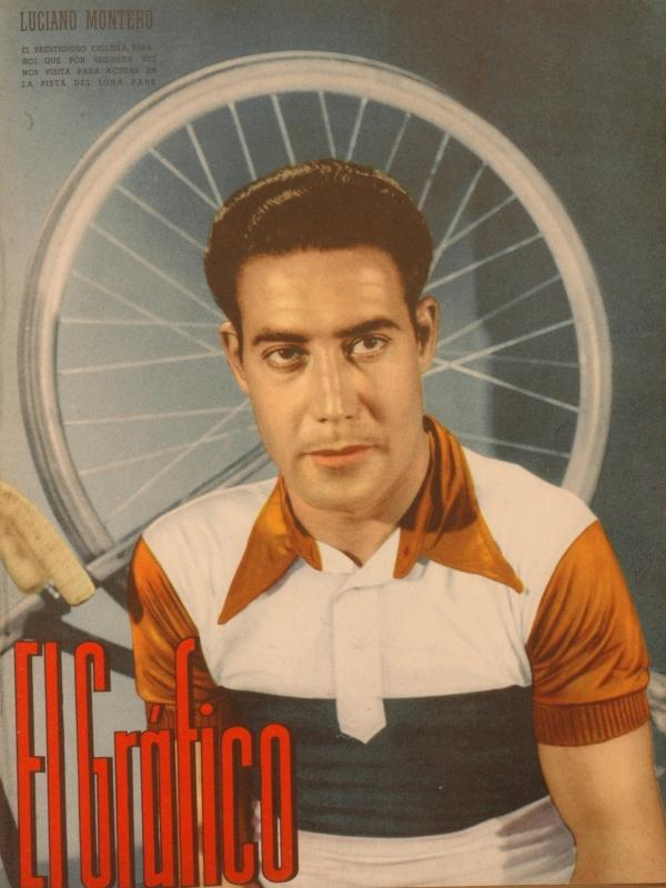 Tapa de la revista El Gráfico: Luciano Montero-1940